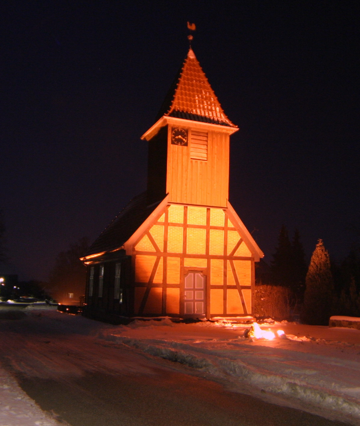 Kapelle in der Gemeinde Basedow (Herzogtum Lauenburg) Carsten Lübbert